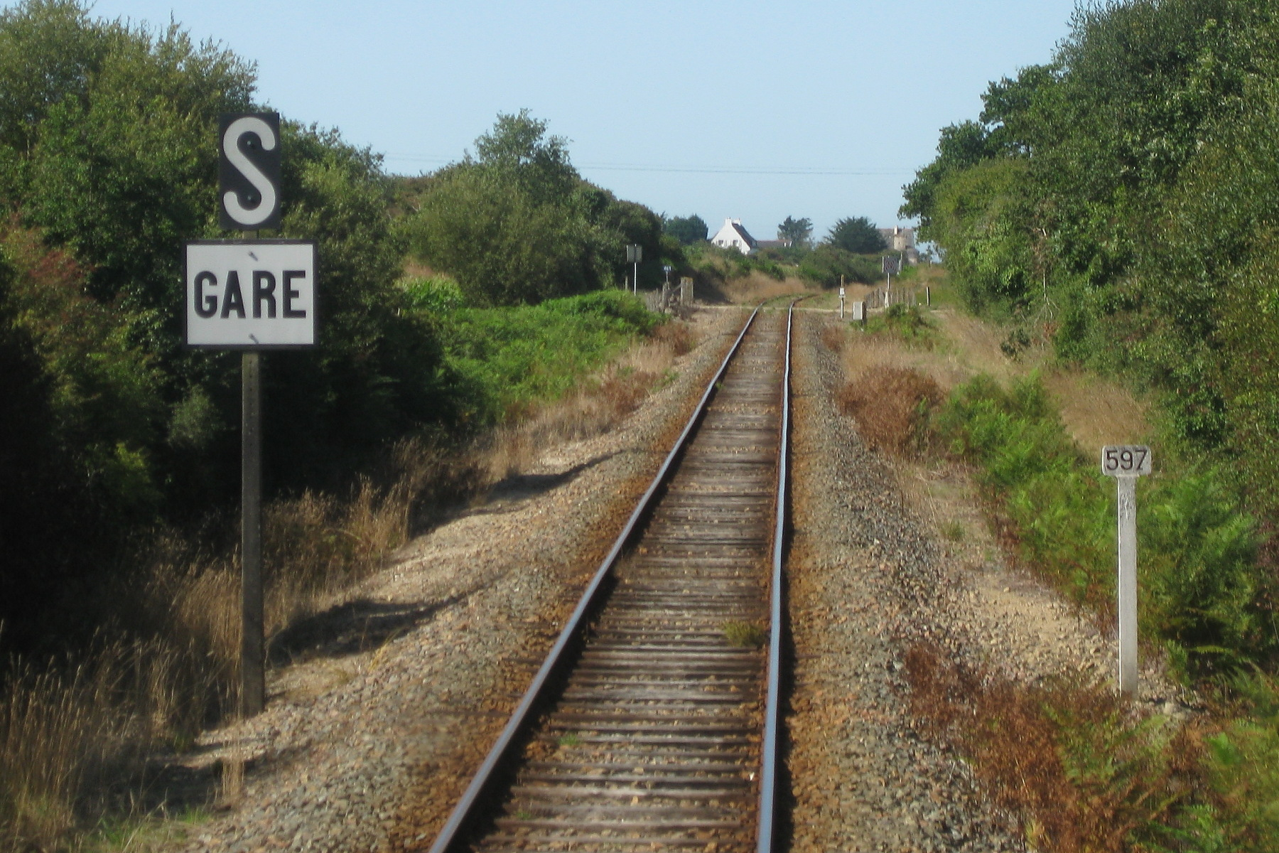 Pancarte « GARE » en « S » annonçant la gare de Plouharnel - Carnac et un passage à niveau.